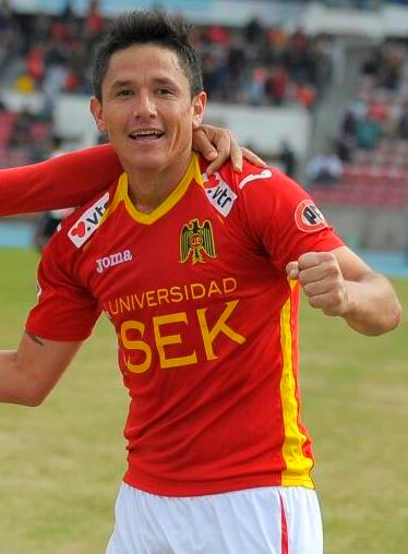 Delantero Club Unión Española